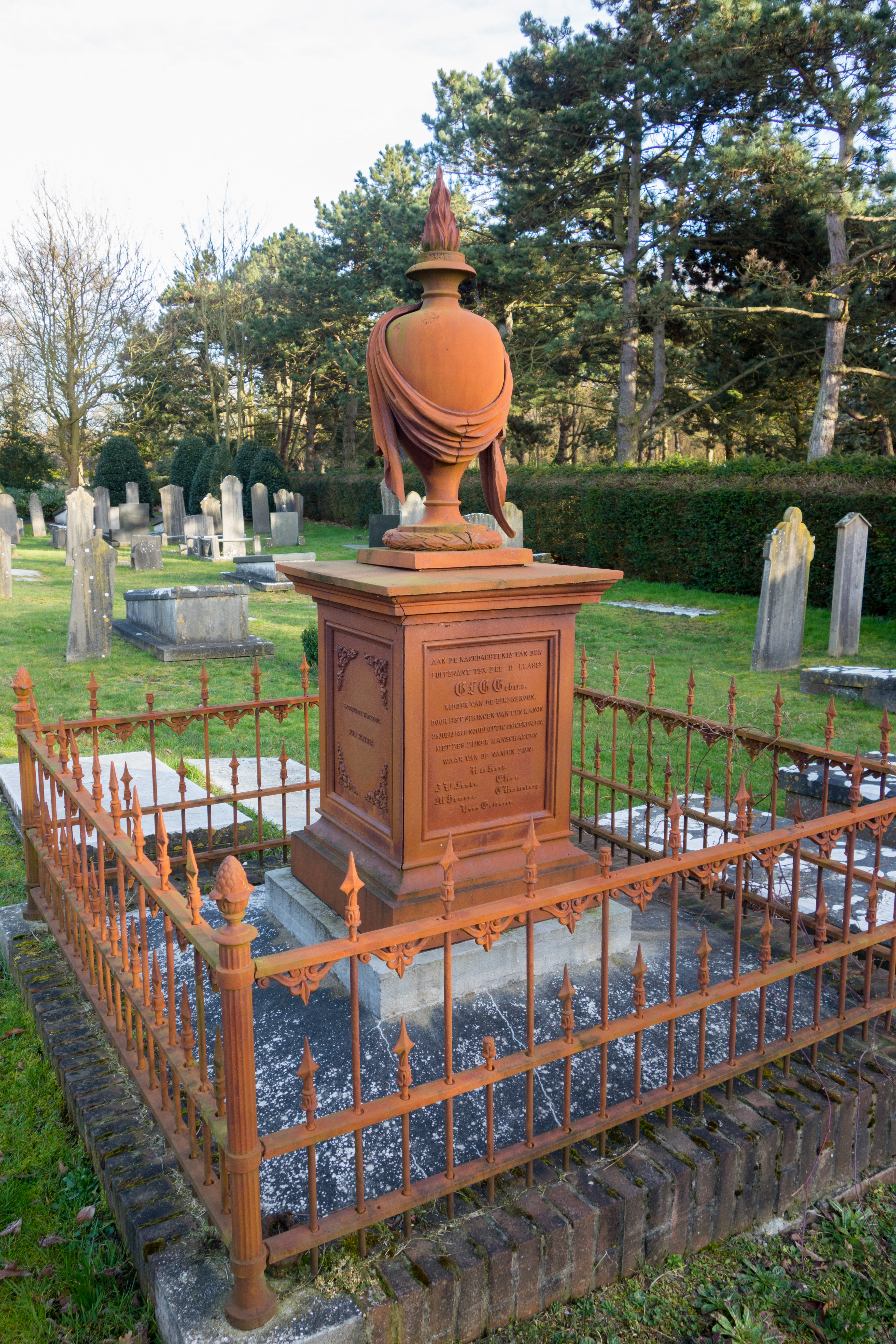 Grafmonument voor G.F.G. Gobius en zijn manschappen. Allen omgekomen op 25 juli 1859 door een gesprongen kanon. Gobius was ridder van de Eikenkroon.